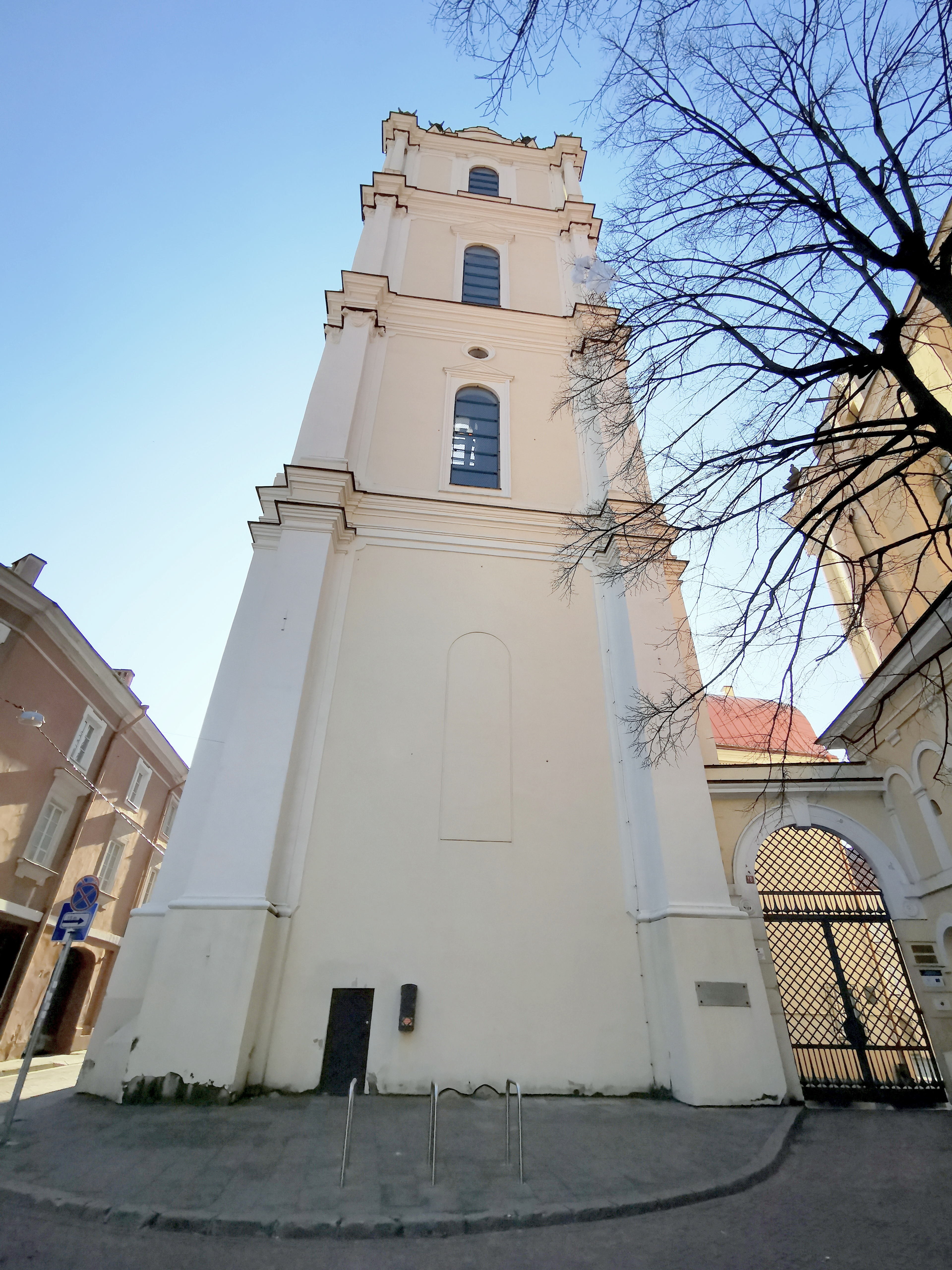 Šventų Jonų bažnyčios varpinė